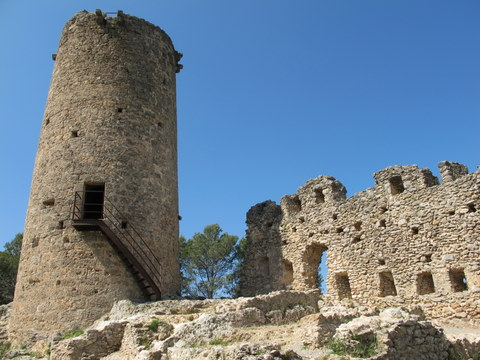 Castell Les Escaules - Catalunya